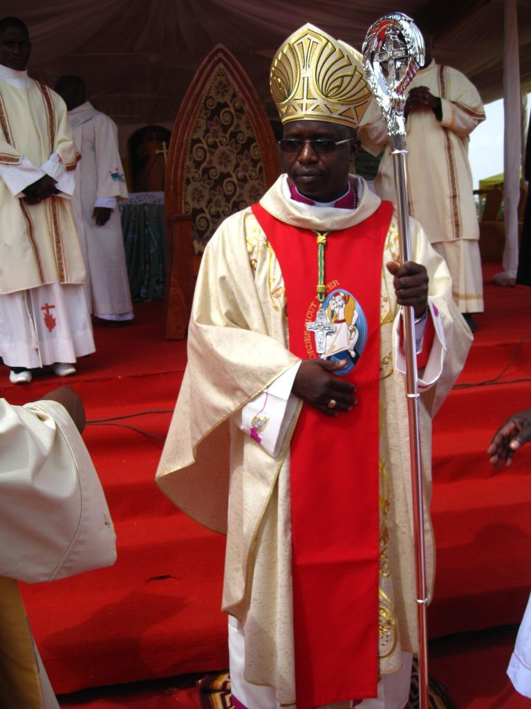 Mgr Emmanuel ABBO, juste après son ordination épiscopale